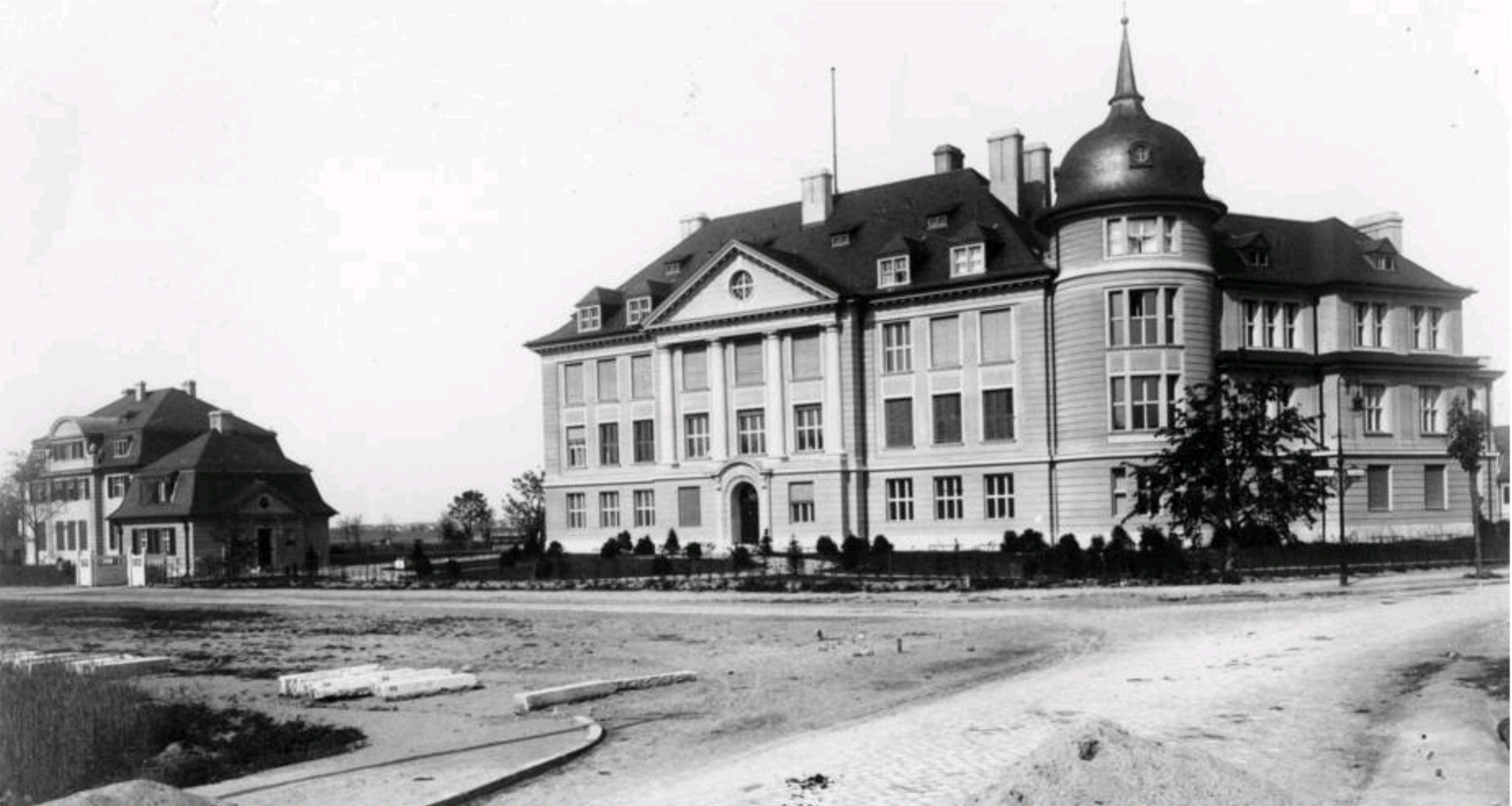 Kaiser-Wilhelm-Institut für Chemie in Dahlem (nach 11 Monaten Bauzeit) - Thielallee 63-65.